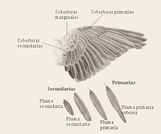 Descripción de la composición de un ala.